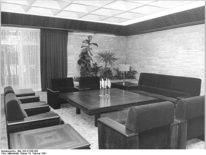 Frankfurt/Oder, Gästehaus des Staatsrats, Konferenzraum ADN-ZB Mittelstädt 8.2.81 Berlin: Frankfurt-Oder: Gesprächsraum im Gästehaus des Staatsrates der DDR an Dölln-See.